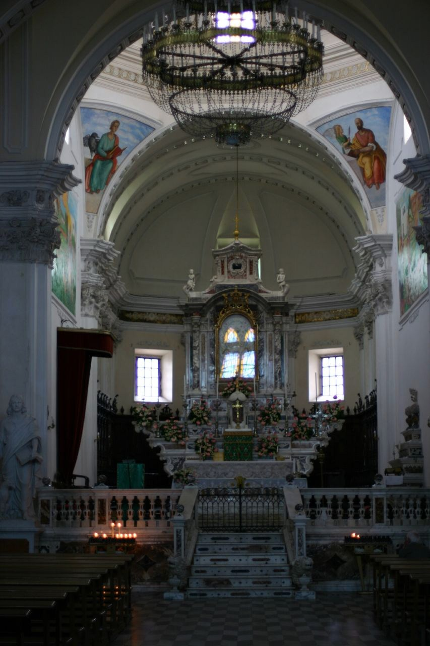 Interno della Basilica di Santa Maria della Neve Cuglieri autore: Mc87